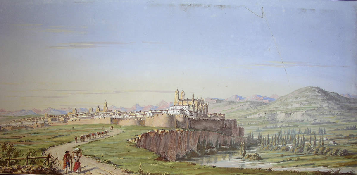 Iruñeko ikuspegia, Nafarroa, Petit de Meurville, Didier, gouachea. Zigilu lakratua atzealdean, 119 zenbakiarekin eta egileak eskuz idatzitako ohar eta sinadurarekin batera; hauexetatik hartu dugu izenburua.